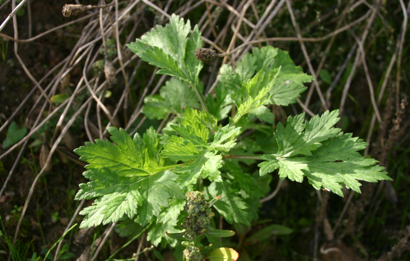 Artemisia vulgaris: Young plant.